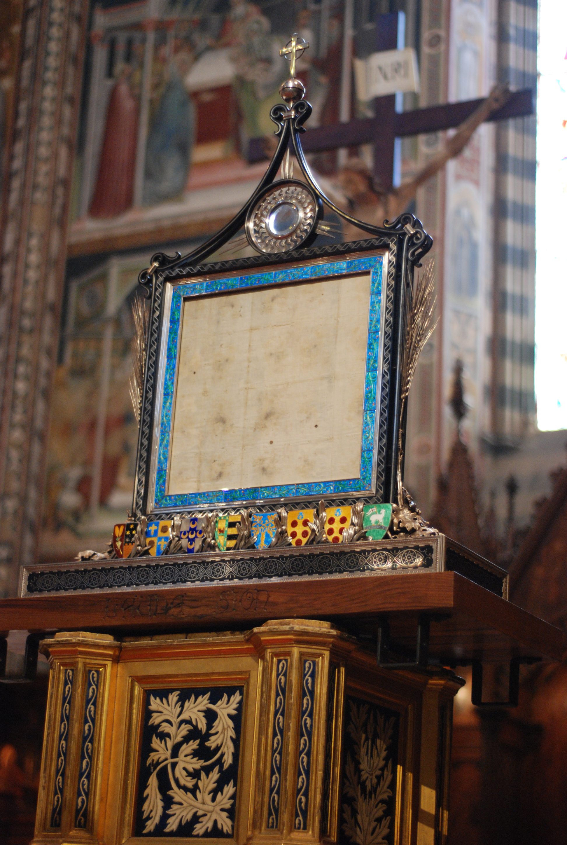 Ostensorio del corporal y de la hostia del milagro eucarístico